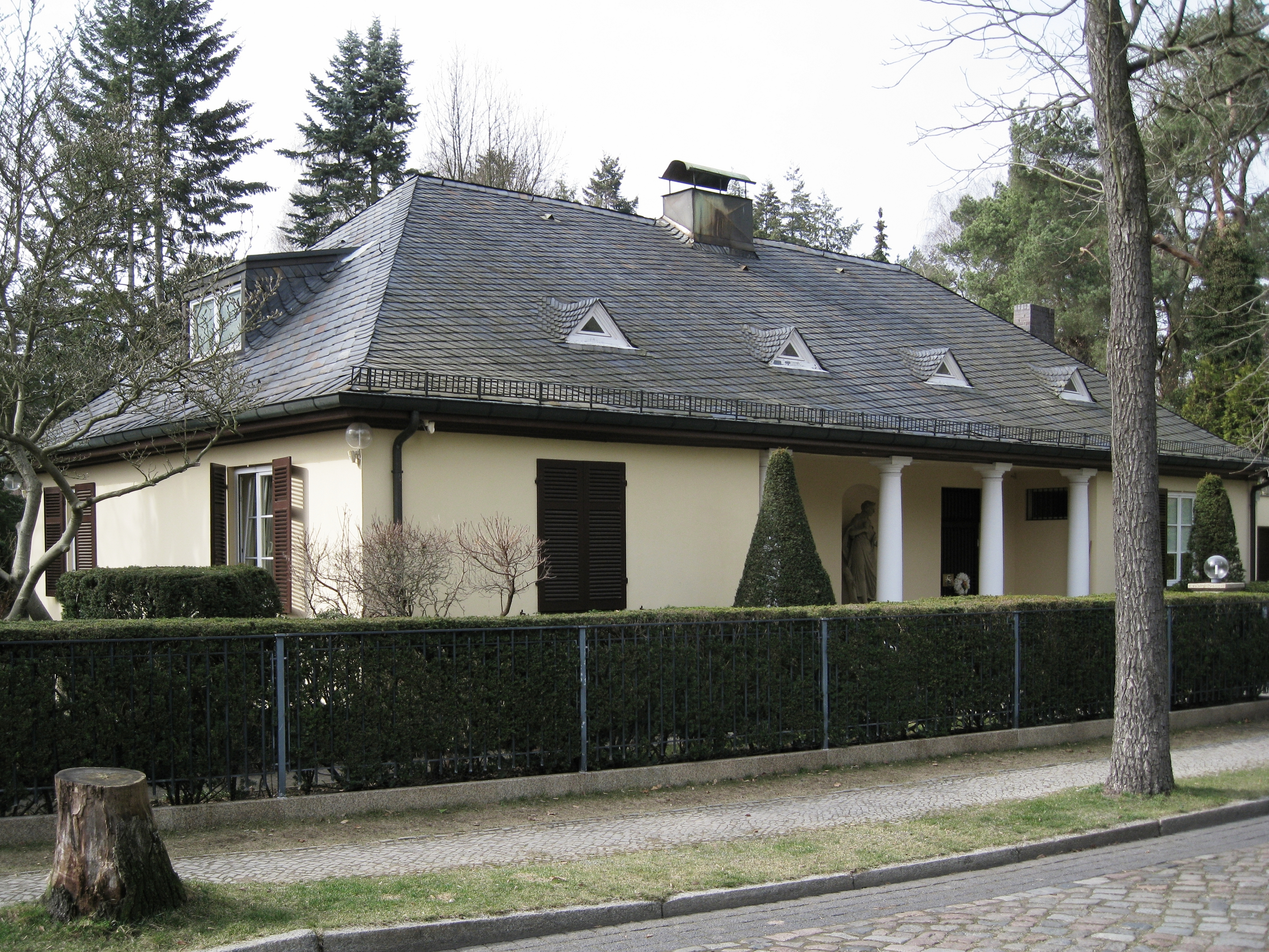 Wohnhaus